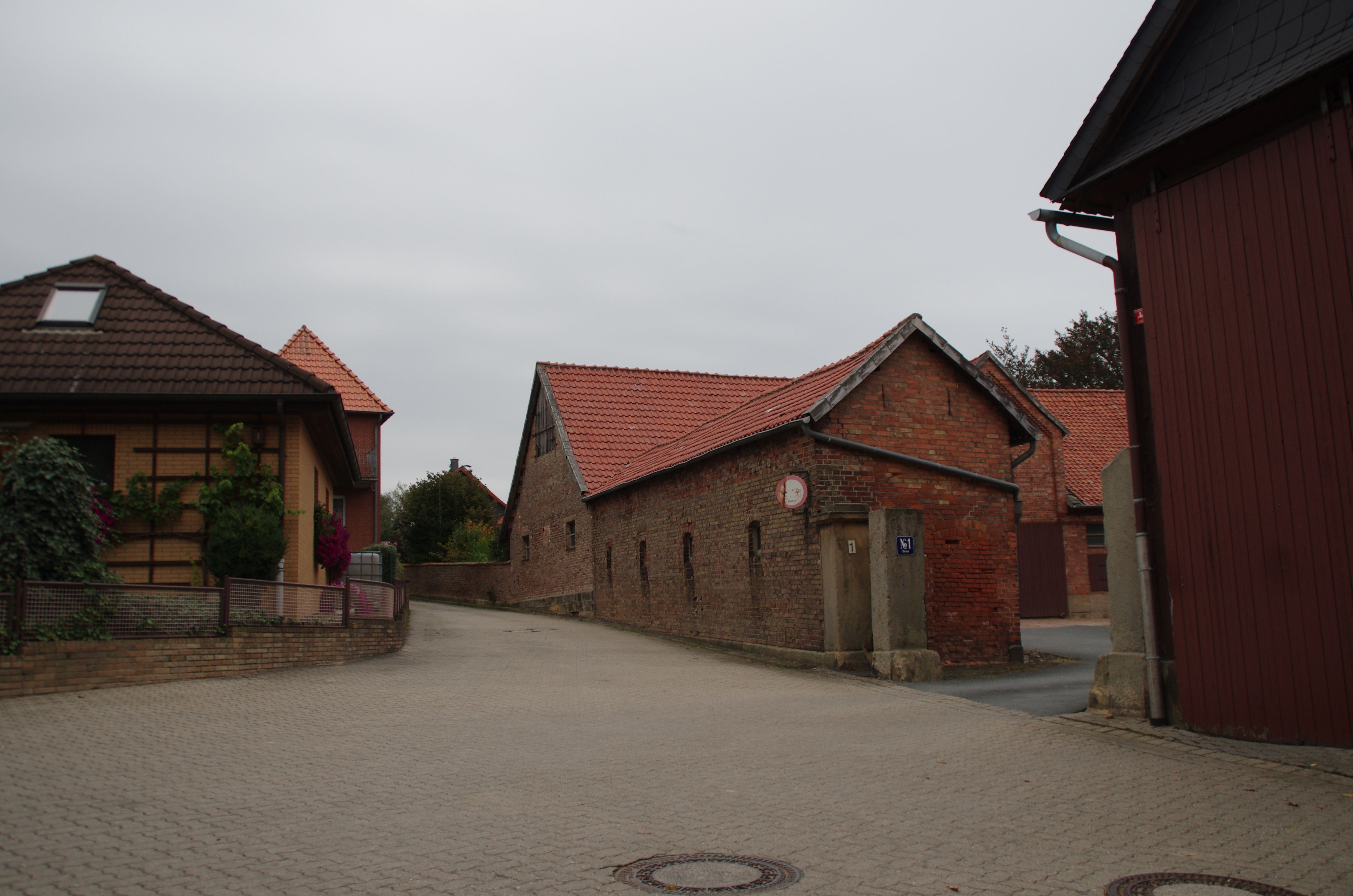 Elbe in Niedersachsen. Der Ort befindet sich im Landkreis Wolfenbüttel.